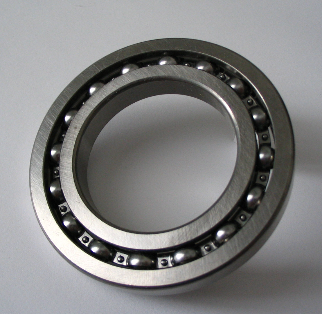 Ball Bearing / Rillenkugellager